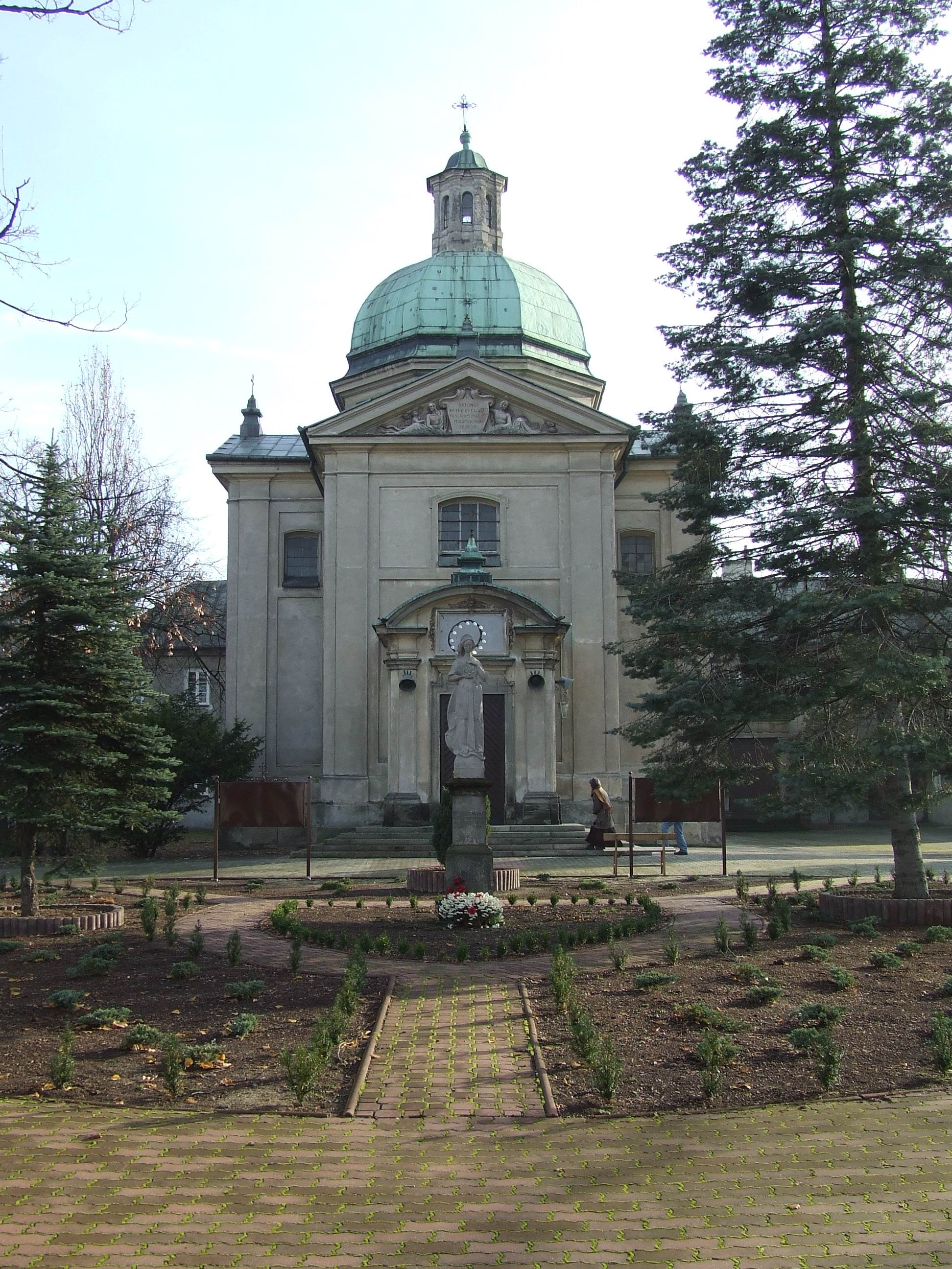 Kościół pod wezwaniem św. Antoniego z Padwy na Czerniakowie w Warszawie, 1690-1693